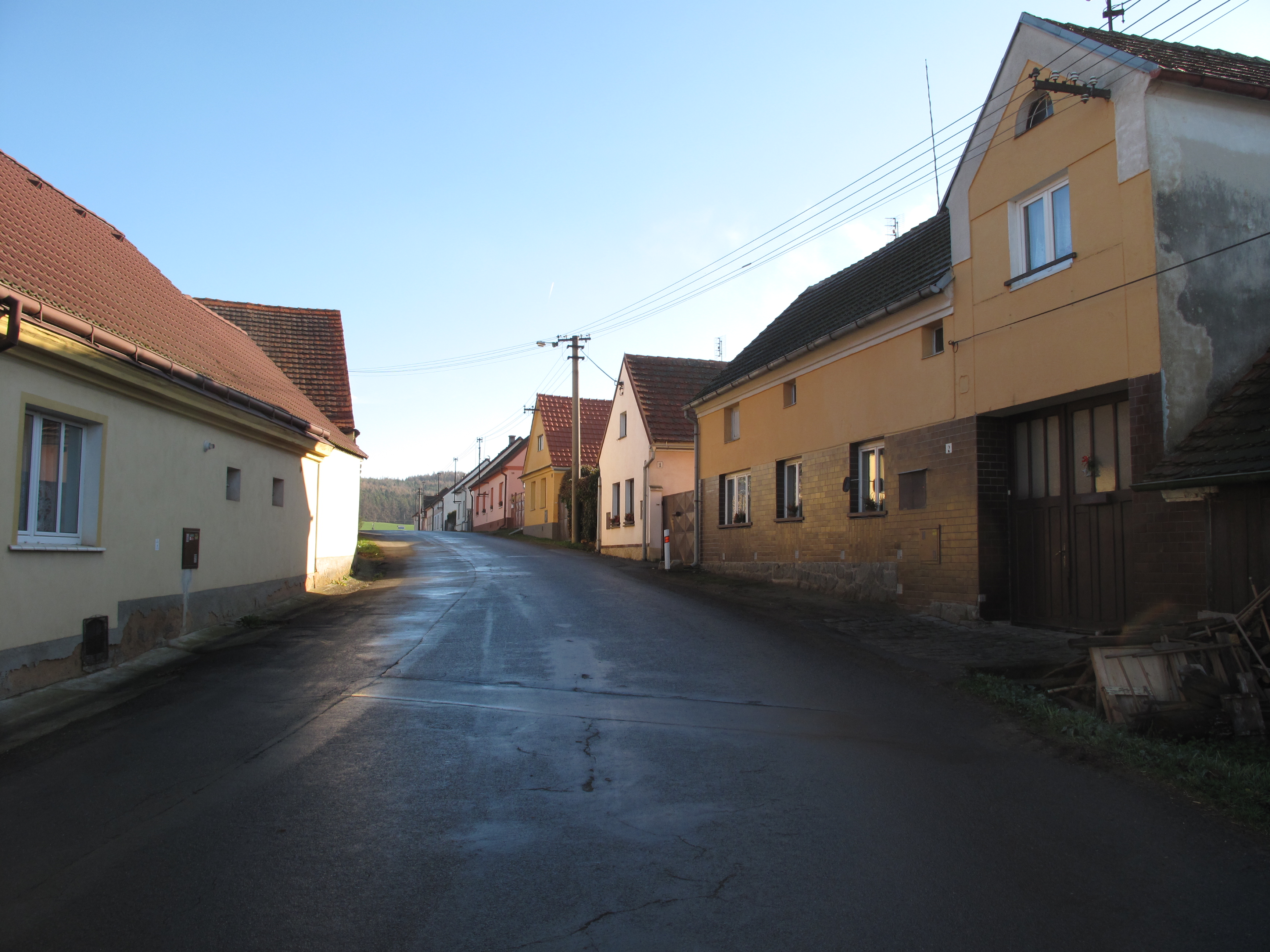 Ulice v Zeměticích. Okres Plzeň-jih, Česká republika.